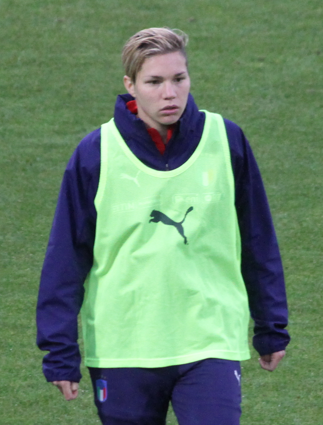 Elena Linari, difensore della nazionale di calcio femminile dell'Italia, durante il riscaldamento tra i due tempi dell'incontro Italia-Belgio del 10 aprile 2018 allo stadio Paolo Mazza di Ferrara.